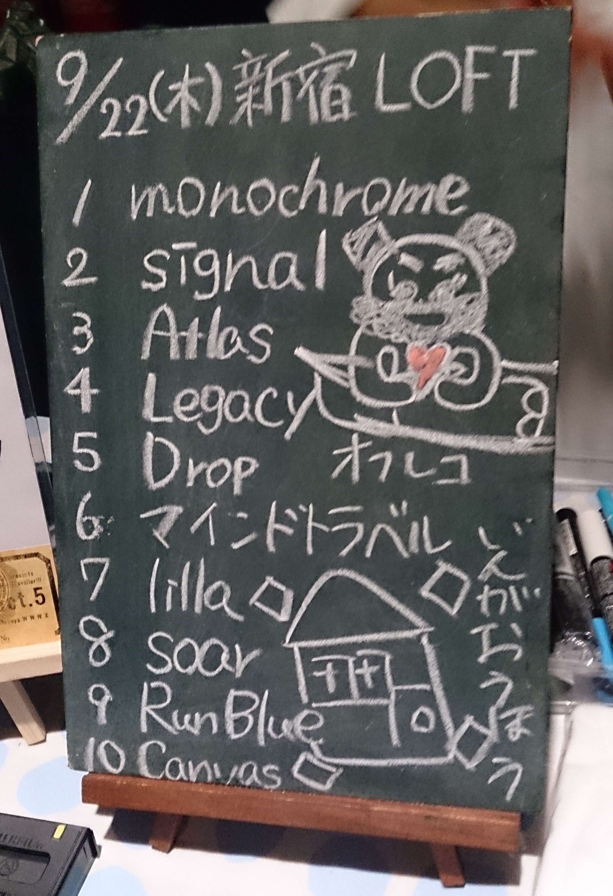 amiinAセトリボード(20160922(2))